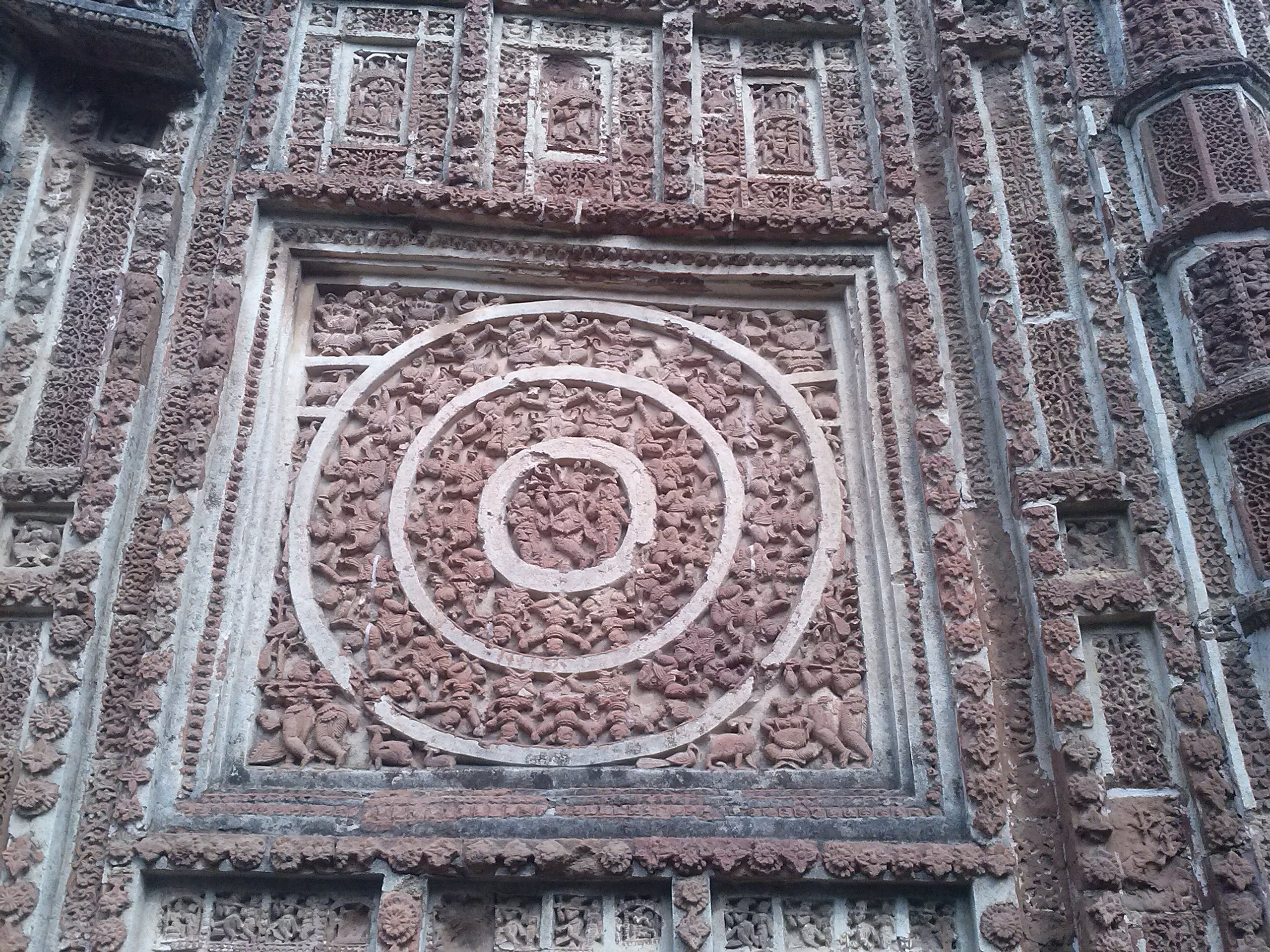 ১৬৪৩ খ্রিস্টাব্দে প্রতিষ্ঠা হওয়া শ্যামরায় মন্দির বা পঞ্চরত্ন মন্দির গাত্রের অপূর্ব রাসচক্র। বাংলায় এর থেকে উচ্চ পোড়ামাটির কাজ আর নেই।